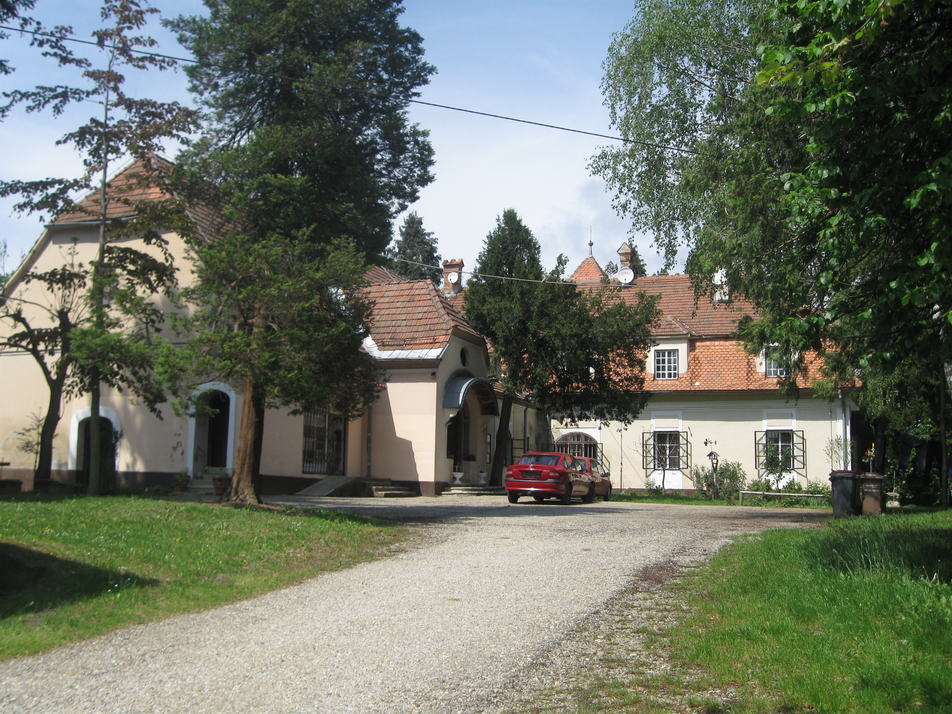 Pritlična podkletena stavba s tlorisom v obliki črke L, zgrajena okoli 1800, 1903 nadzidana. zunanjščina s stebriščnim altanom daje vtis podeželske vile. Ob njej je štiritraktno gospodarsko poslopje. Park, urejen 1903, je slabo ohranjen.